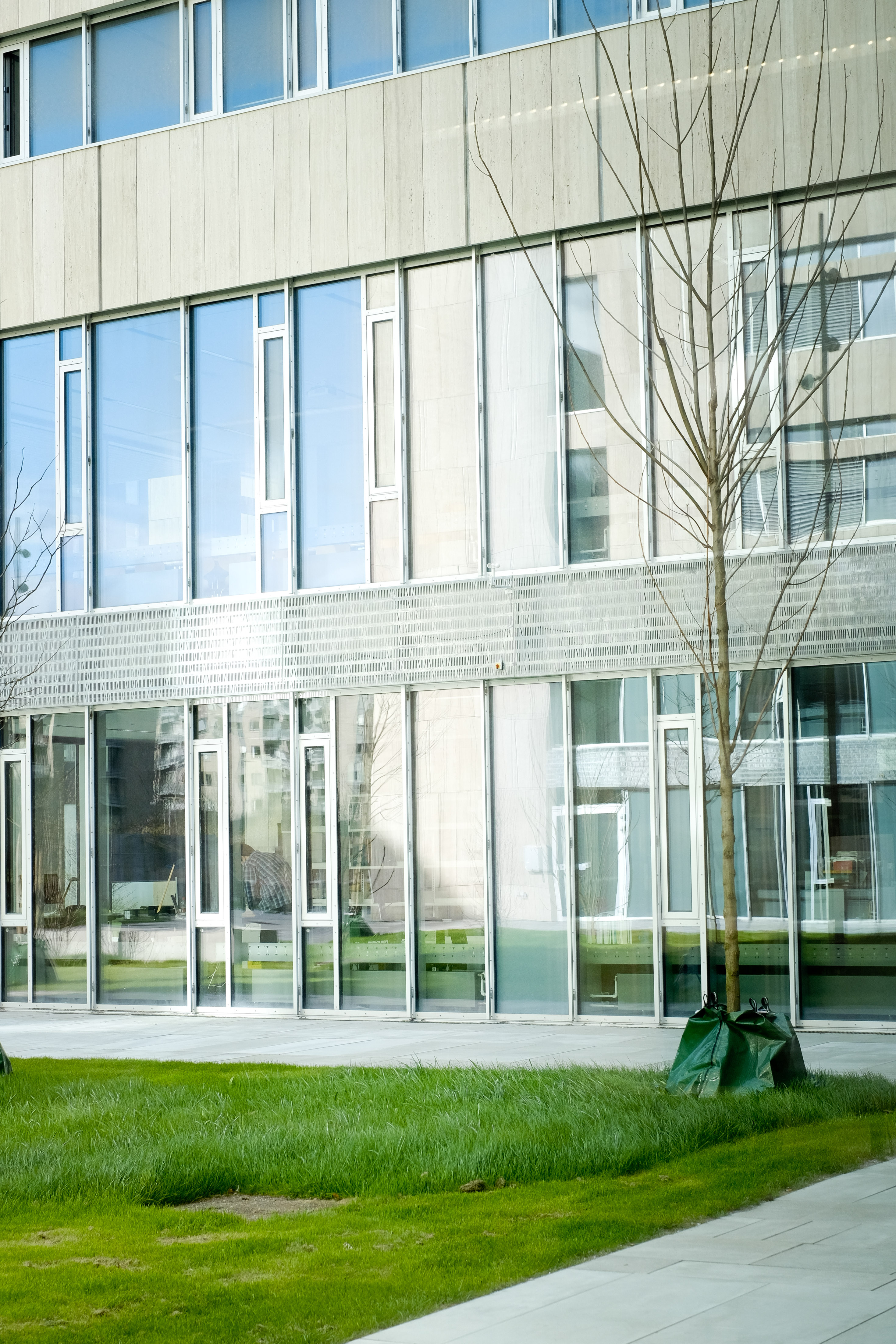 University of Copenhagen